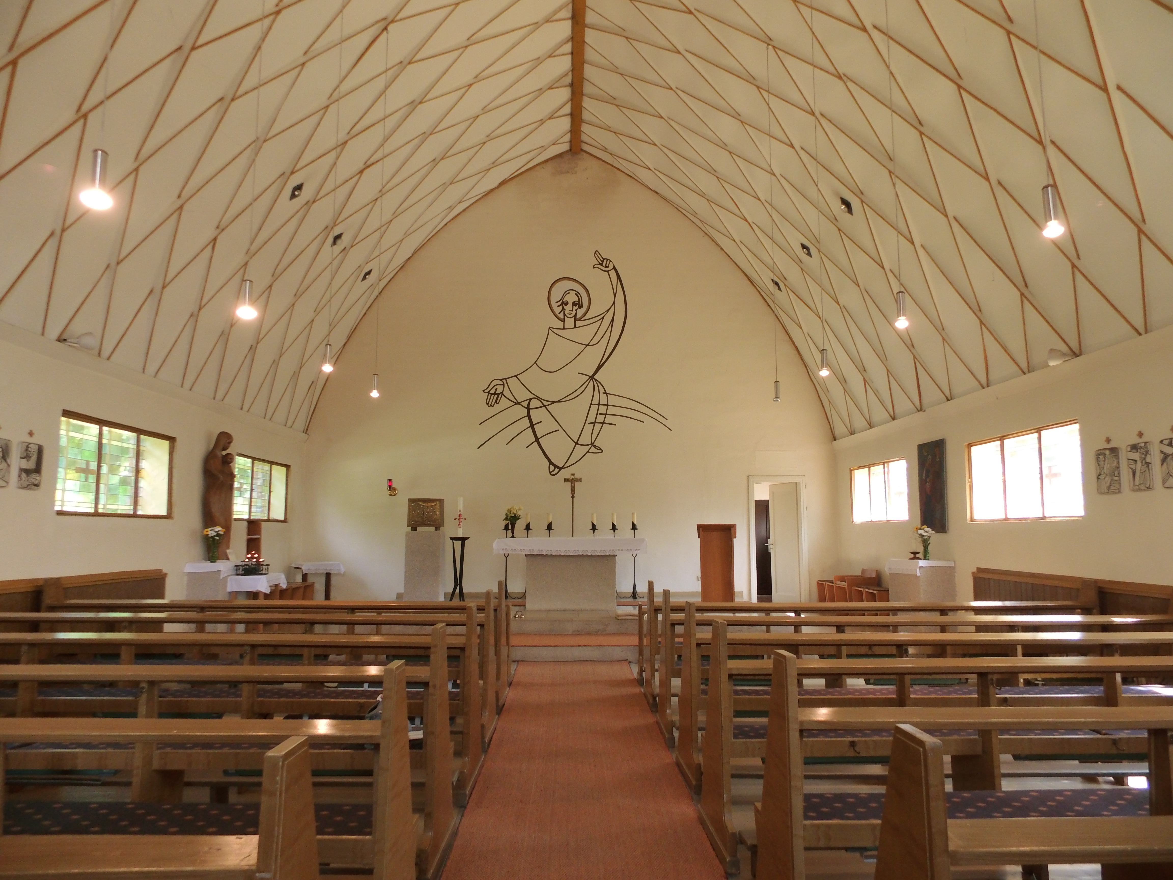 Katholische St.-Joseph-Kirche in Klötze (Sachsen-Anhalt)